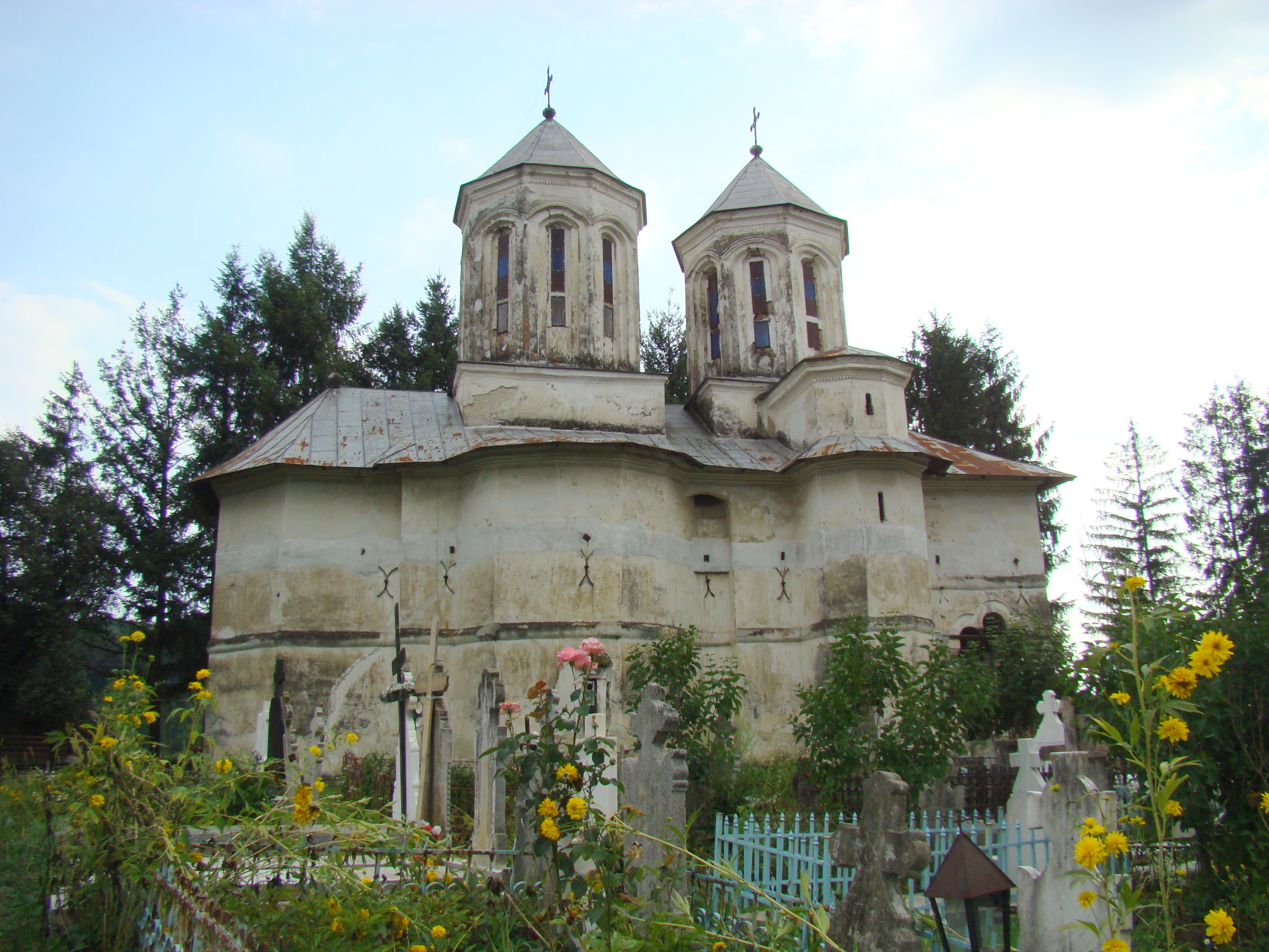 Biserica „Sf. Gheorghe”, „Sf. Nicolae”, sat Zorlești; comuna Prigoria